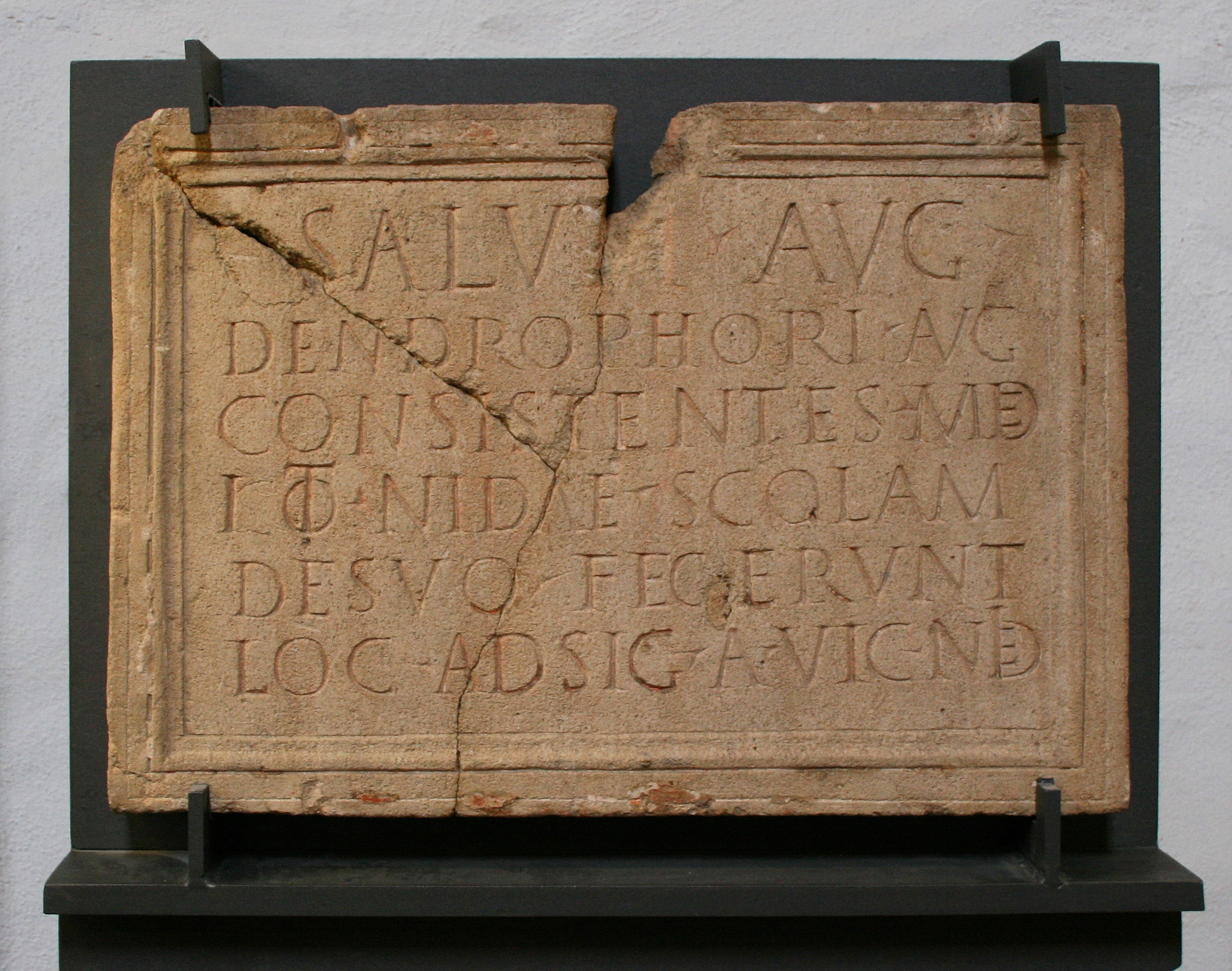 Dendrophoreninschrift aus einem Keller der Römerstadt NIDA-Heddernheim im Archäologischen Museum Frankfurt a.M.. Mit freundlicher Genehmigung des Museums. Lesung: SALVTI AVG(ustae) DENDROPHORI AVG(ustales) CONSISTENTES MED(...) IT(em)Q(ue) NIDAE SCOLAM DE SVO FECERVNT LOC(o) ADSIG(nato) A VIC(anis) NIDE(nsibus) Übersetzung: Zum Heil des Kaisers Die Dendrophoren und Priester des Kaiserkultes ansässig in Med(...) und Nida haben das Versammlungshaus aus eigenen Mitteln errichtet. Das Grundstück wurde ihnen von den Bürgern von Nida zugewiesen. References: Schillinger 00104 = AE 1962, 00232 = AE 2001, +01543